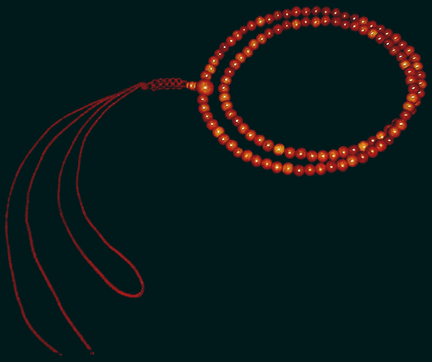 臨済宗で用いられる本連数珠